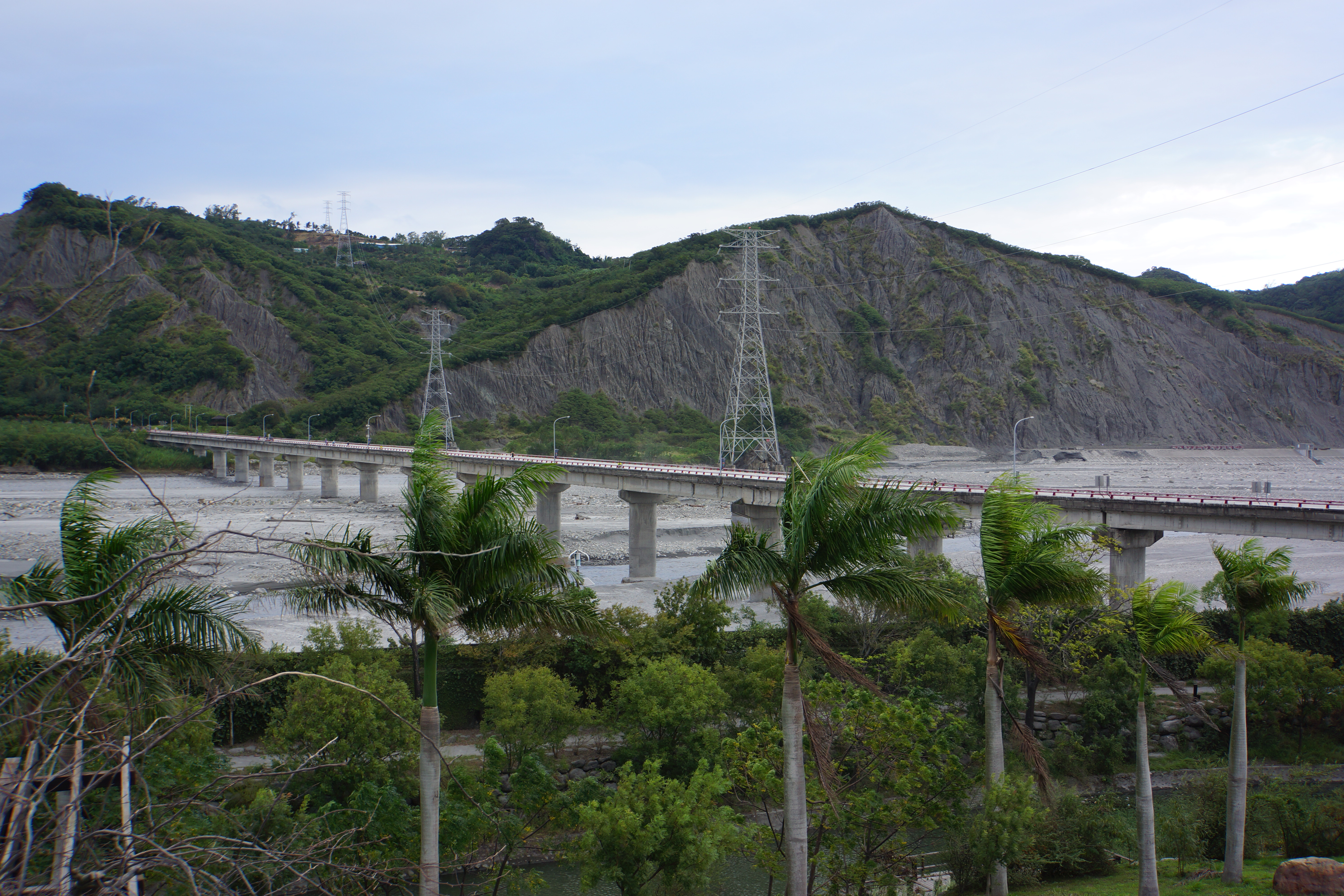 卑南大橋 Beinan Bridge